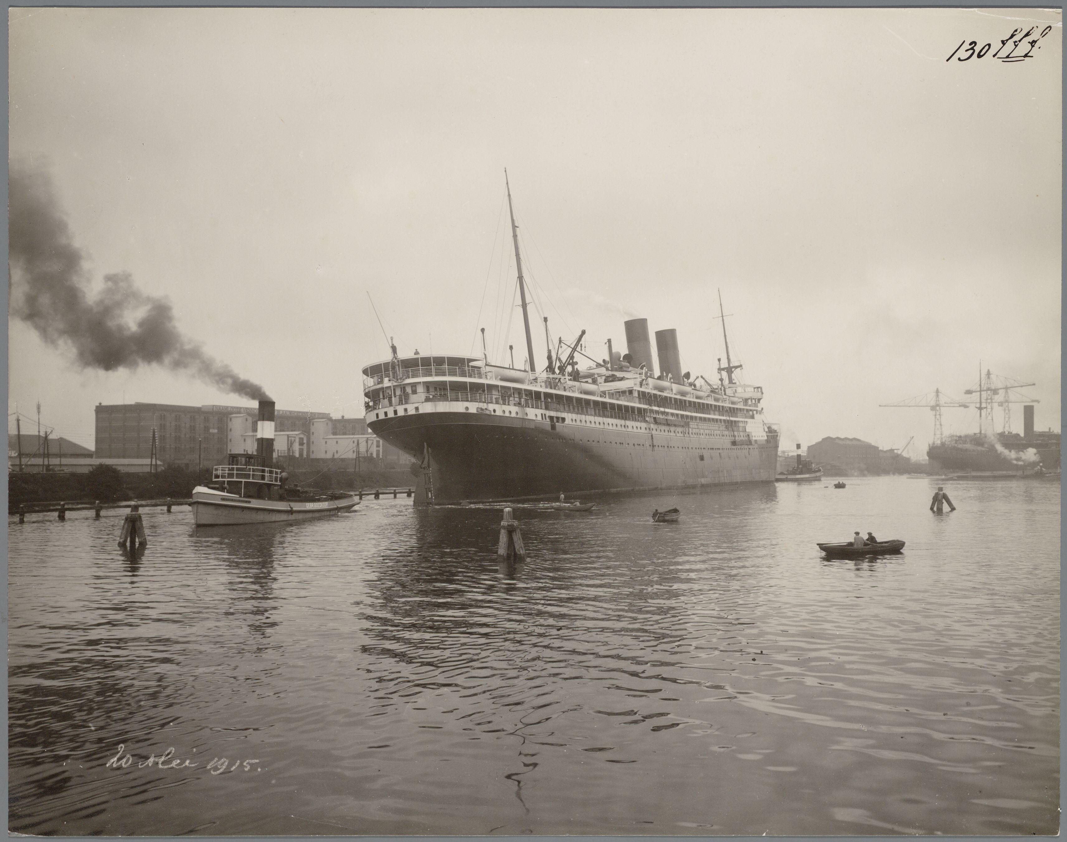 Beschrijving Het ss. Jan Pieterszoon Coen op sleeptouw Bouwnummer 130, gebouwd op de werf van de Nederlandsche Scheepsbouw Maatschappij (N.S.M.) in opdracht van de Stoomvaart Maatschappij Nederland. Hier wordt het schip versleept van de werf naar de etablissementen van de Stoomvaart Maatschappij Nederland. Het schip werd in 1915 in de vaart genomen. Op 14 mei 1940 werd het op last van de Marine-autoriteiten van Amsterdam in de havenmonding van IJmuiden tot zinken gebracht als versperring voor de Duitsers. Na de oorlog is het wrak opgeruimd. Documenttype foto Vervaardiger Oosterhuis, Gustaaf (1858-1938) Collectie Archief Nederlandse Dok- en Scheepsbouw Mij.: foto's Datering 20 mei 1915 Inventarissen Afbeeldingsbestand 010179000190 Generated with Dememorixer